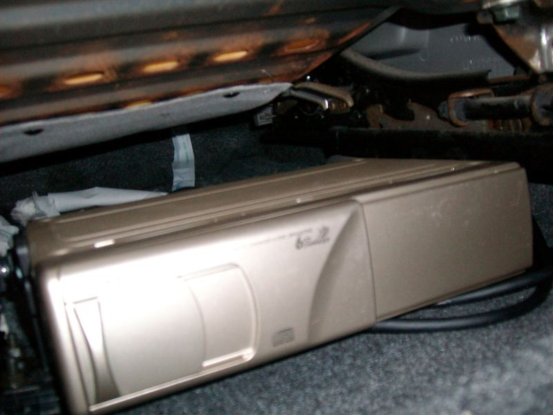 本人所有の自動車に搭載されてるステレオのCDチェンジャーです。